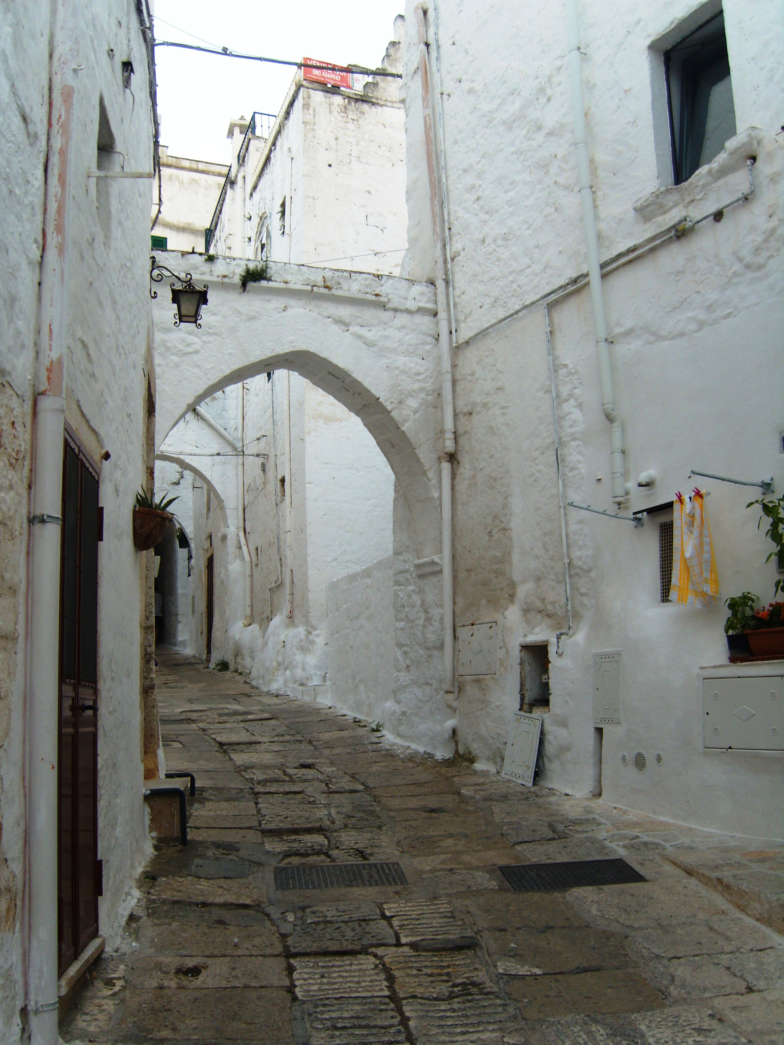 Ostuni (BR) - via Continelli Bixio